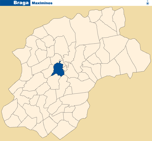 Localização de Maximinos no concelho de Braga.